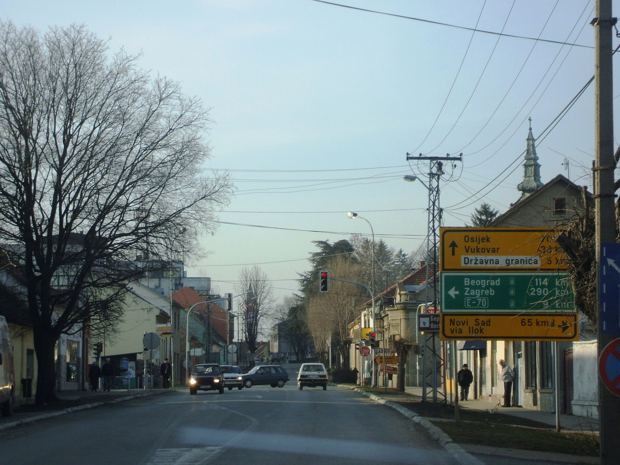 Hlavní ulice ve městě Šid, Srbsko